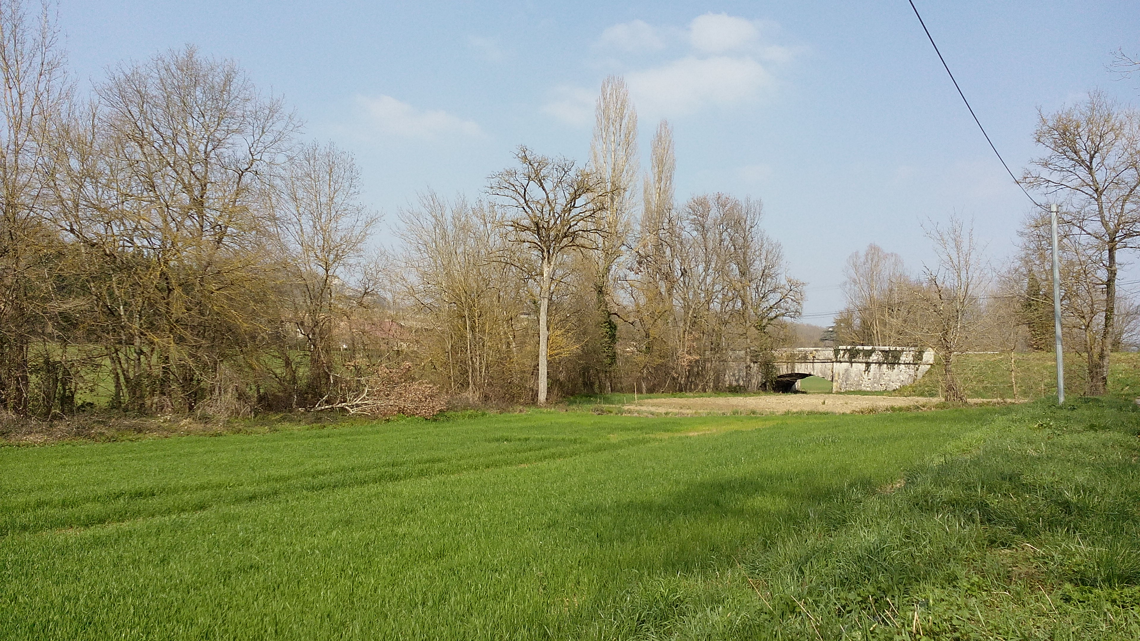 Pont en pierre sur la Lupte, à proximité de l’Église de Russac, située sur la commune de Castelnau-Montratier dans le Tarn-et-Garonne.